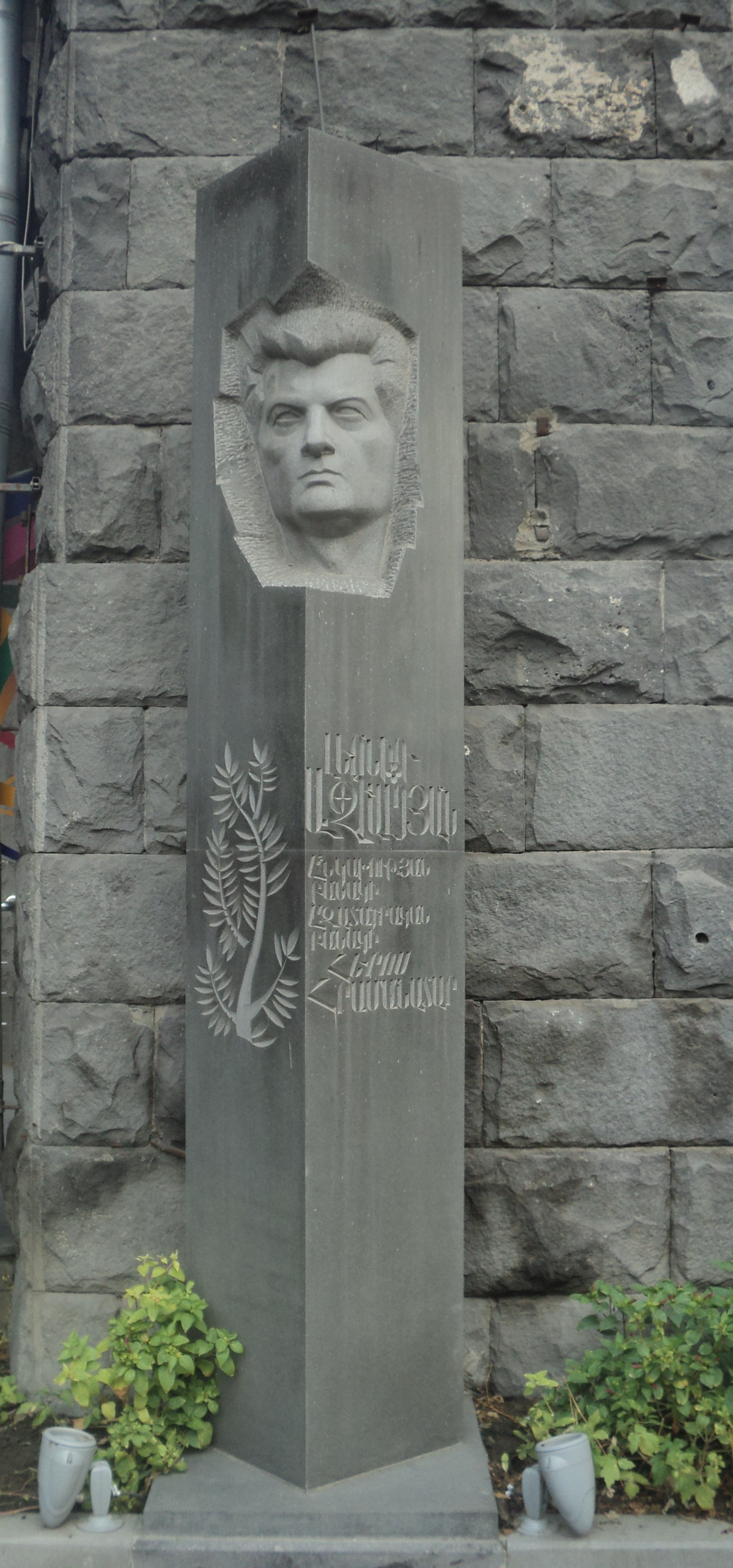 «Անկախության բանակի» հրամանատար, Արցախյան պատերազմի հերոս Լեոնիդ Ազգալդյանի կիսանդրի